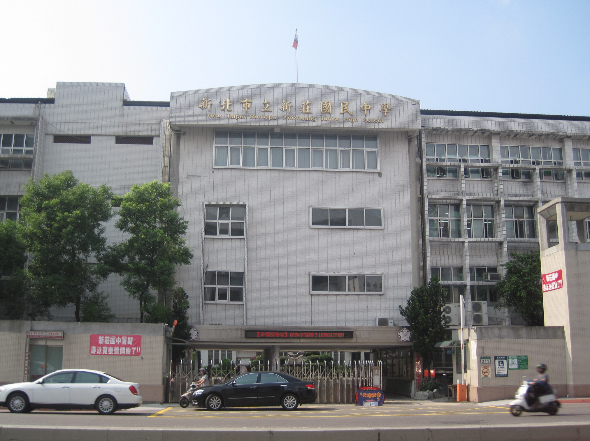 新莊區新莊國中